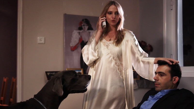 דוד שאדי, יעל דואני והכלבה פיונה בסרט ג'נטל דוג